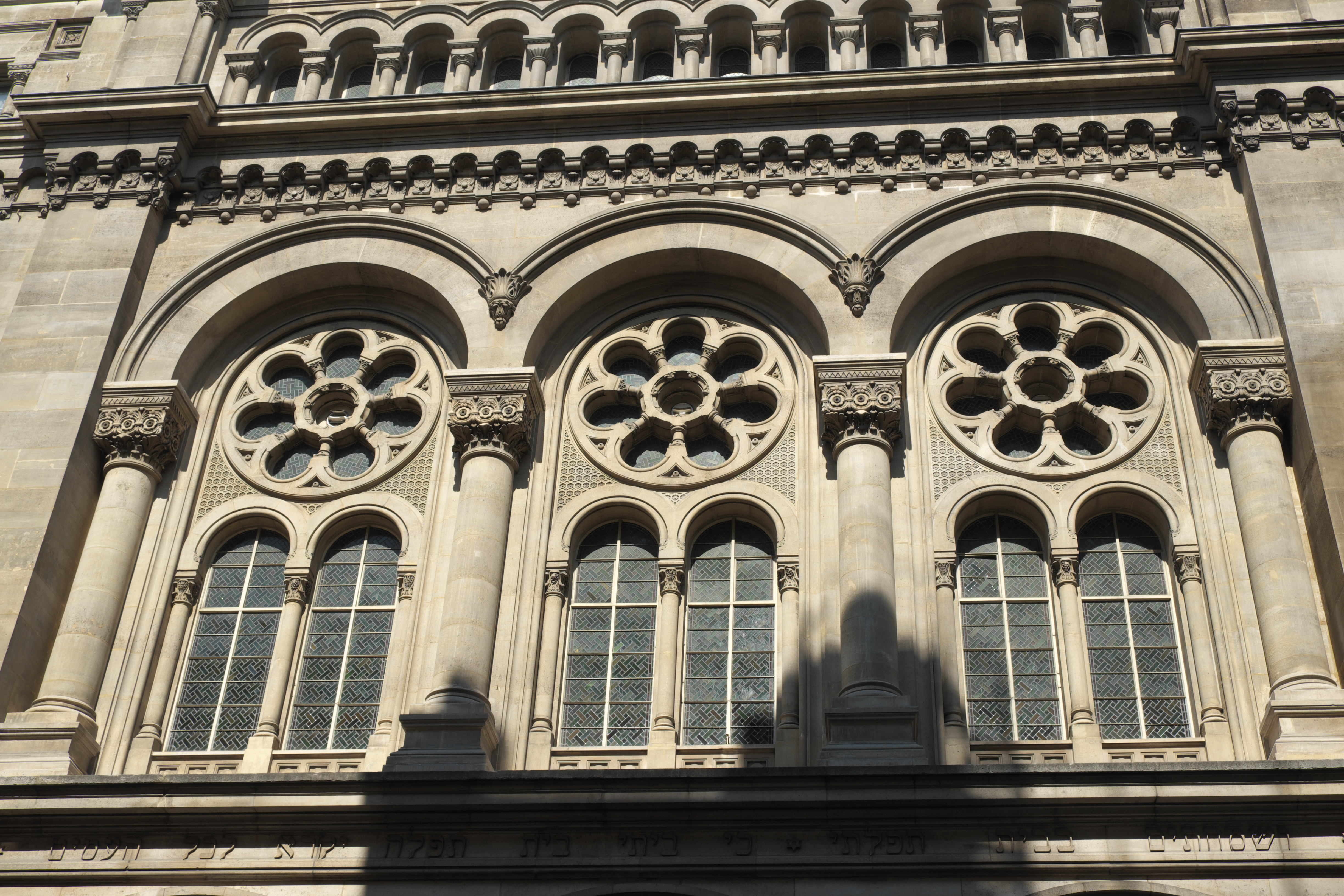 Große Synagoge oder Synagogue de la Victoire, 44, rue de la Victoire im 9. Arrondissement von Paris